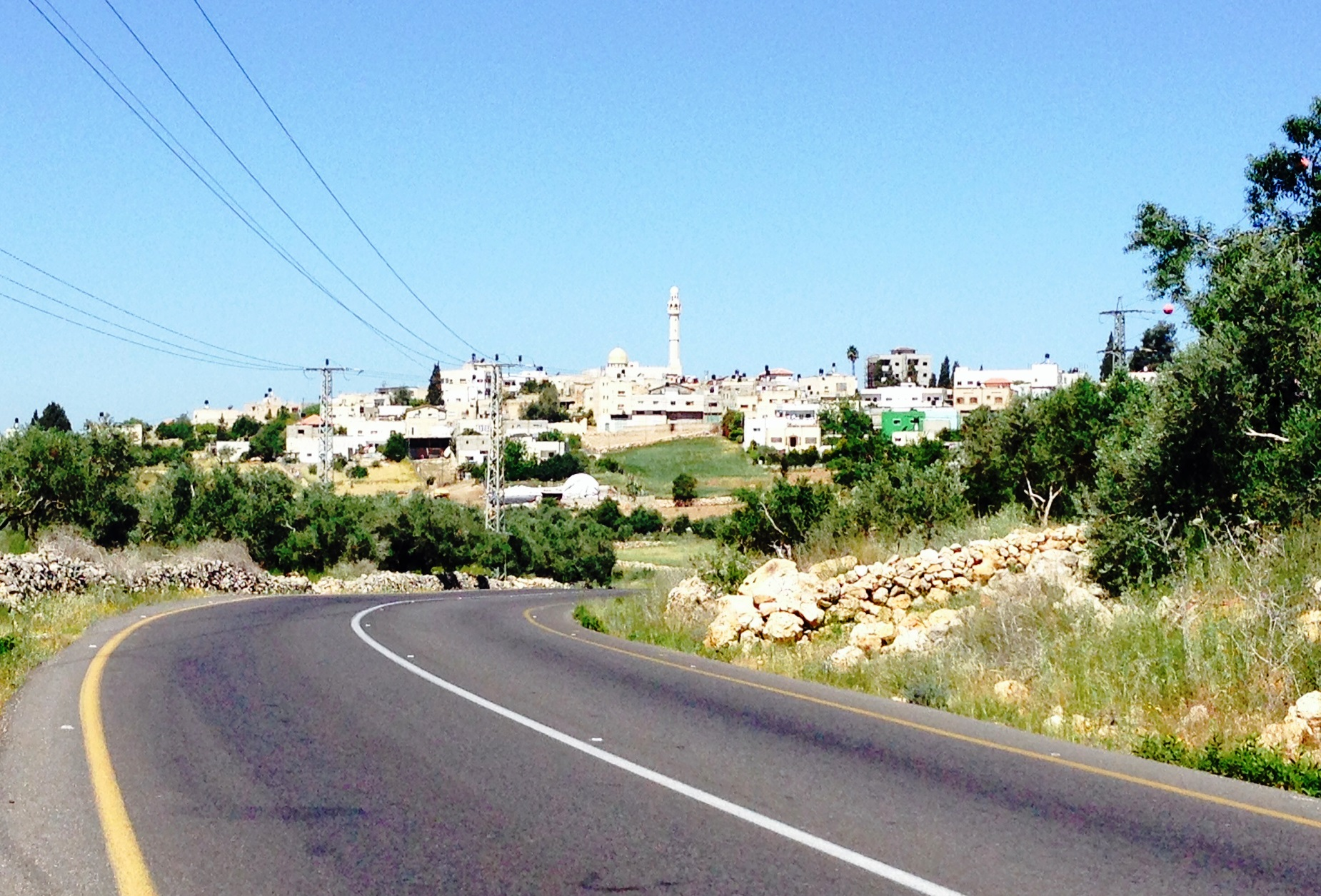 הכפר הפלסטיני ג'ינסאפוט - מראה מהכביש